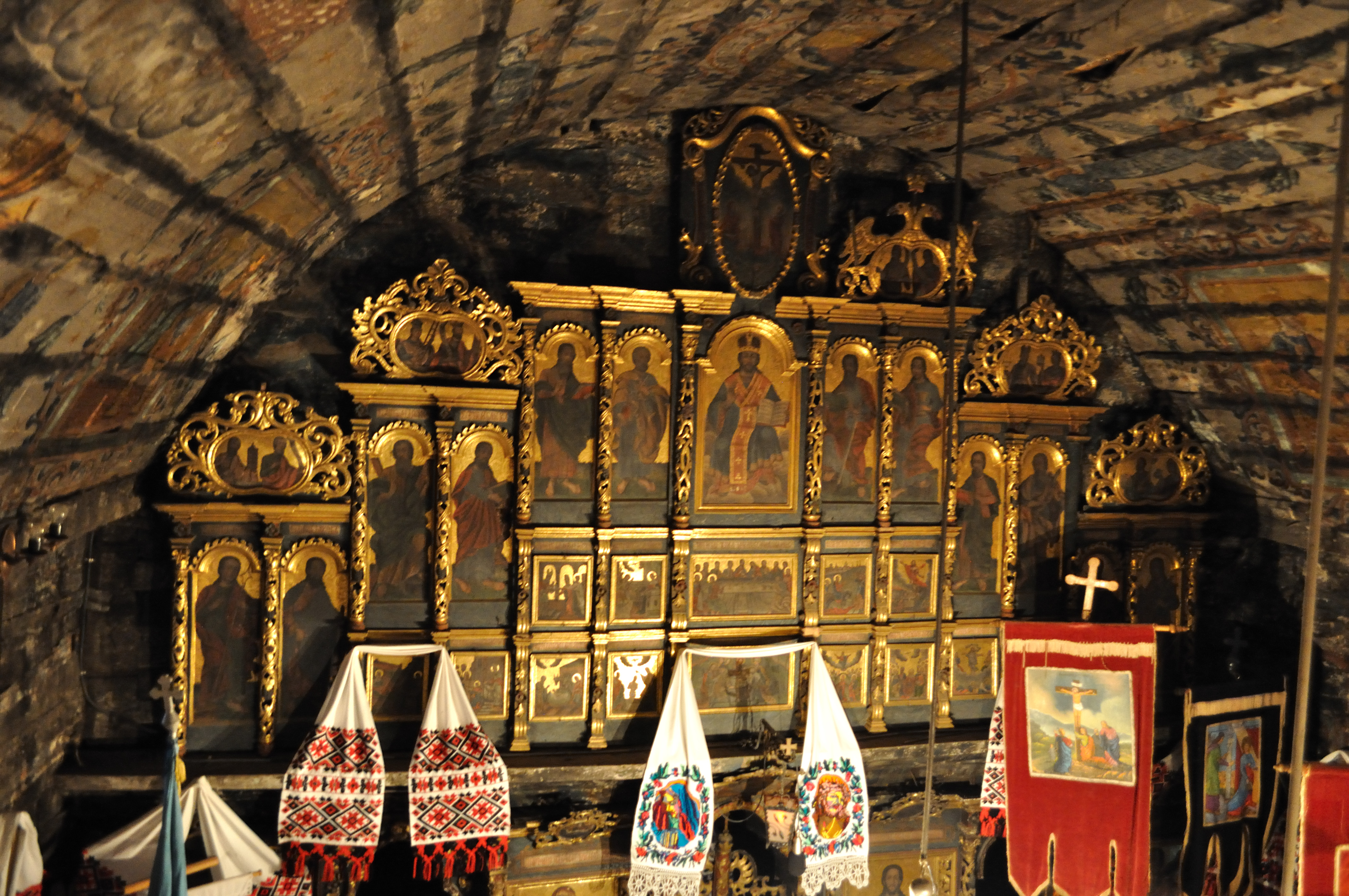 Biserica de lemn „Sfinții Arhangheli” din Șurdești, județul Maramureș